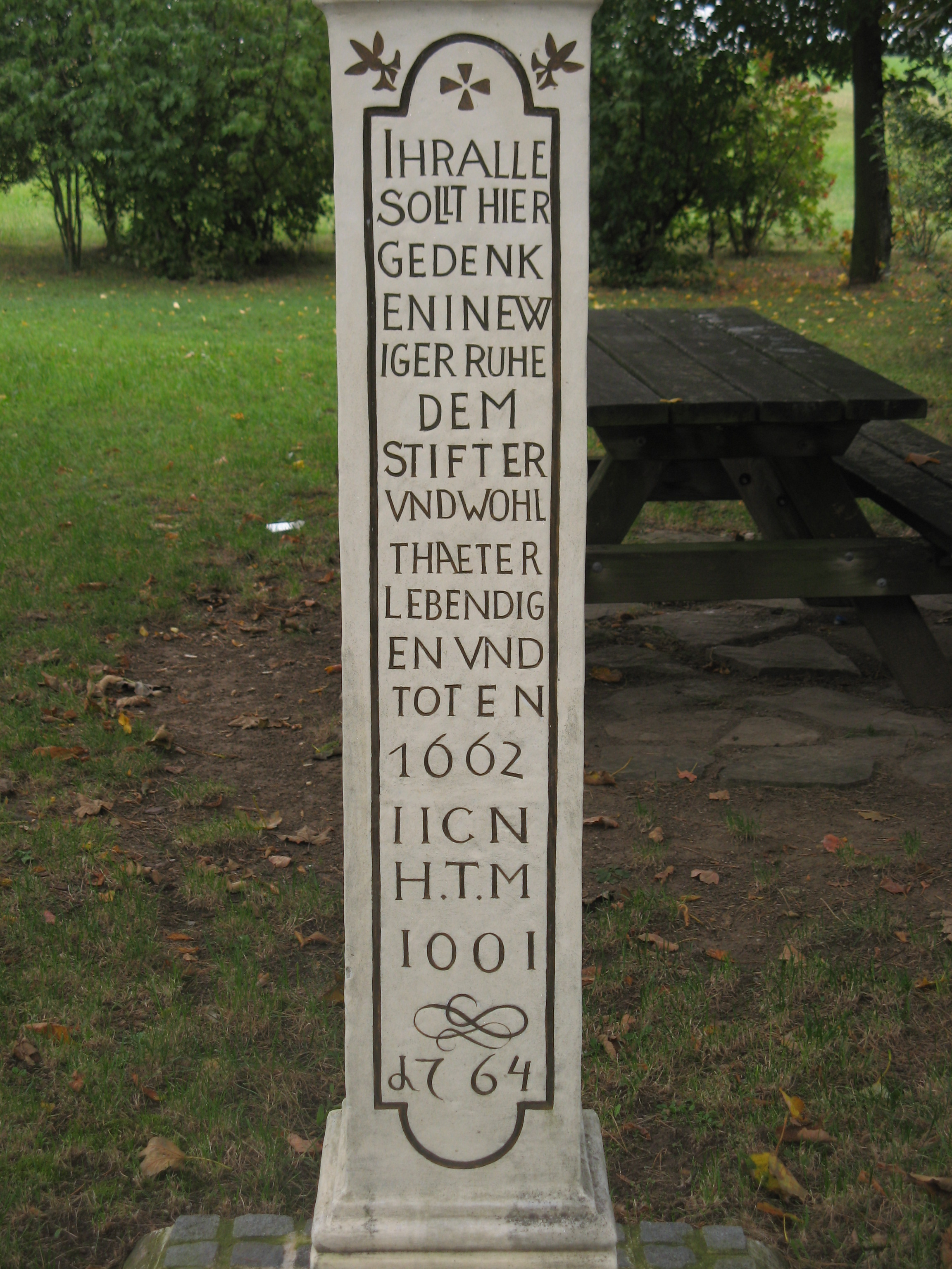 Basis der Immaculatasäule (1662), Am Johannesberg, Unterlaa, Wien-Favoriten